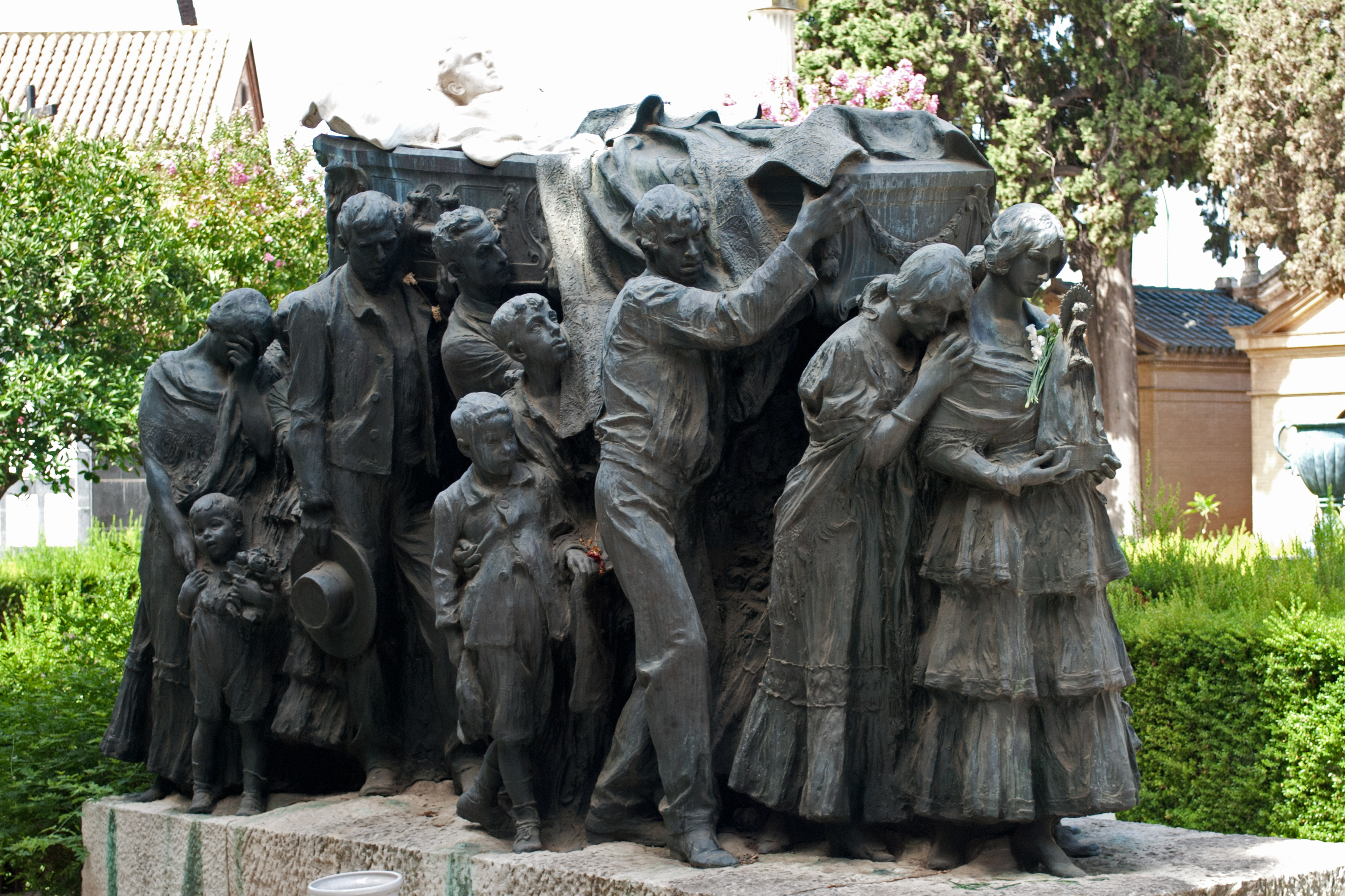 Monumento funerario al torero Joselito "El Gallo", en el Cementerio de San Fernando de Sevilla